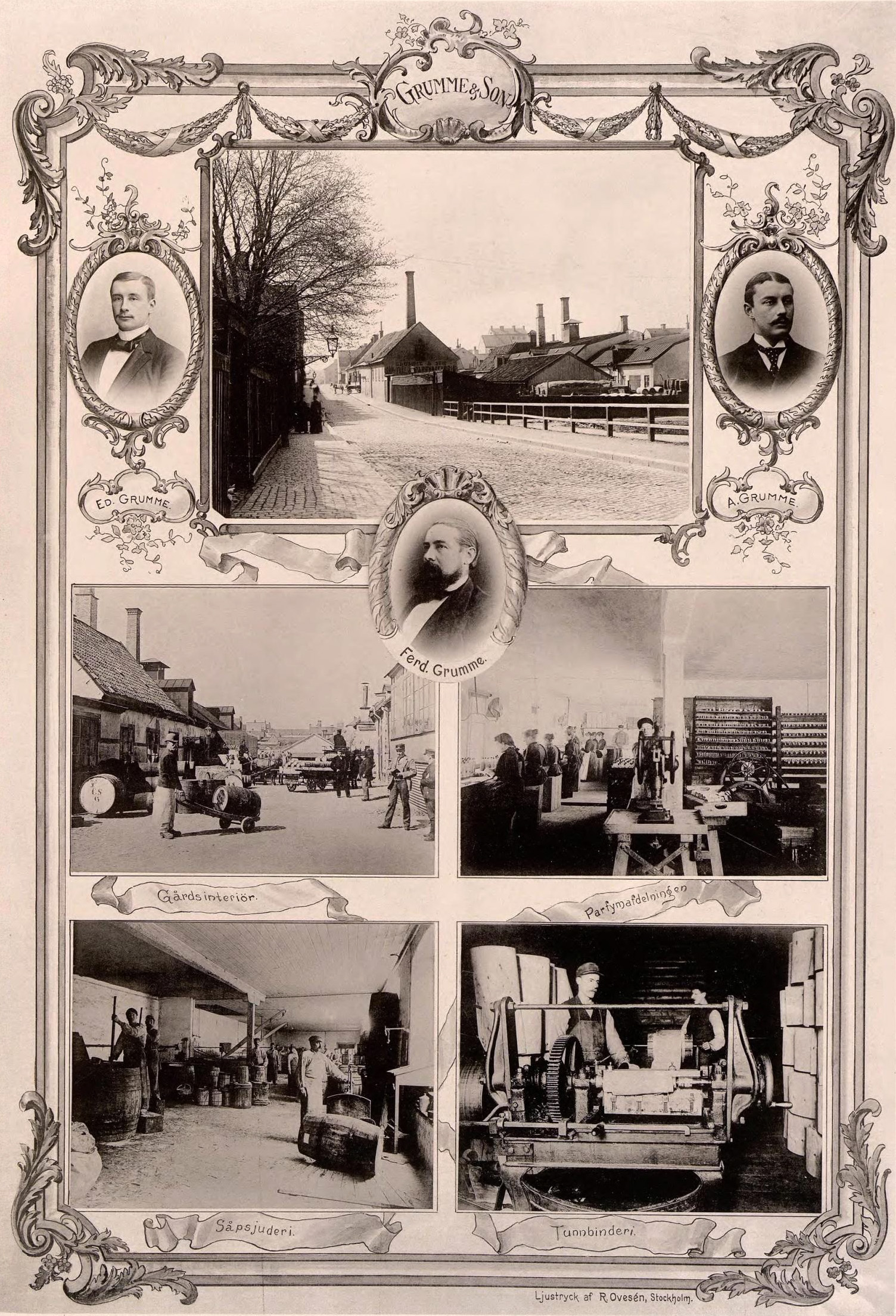 Grumme & Son